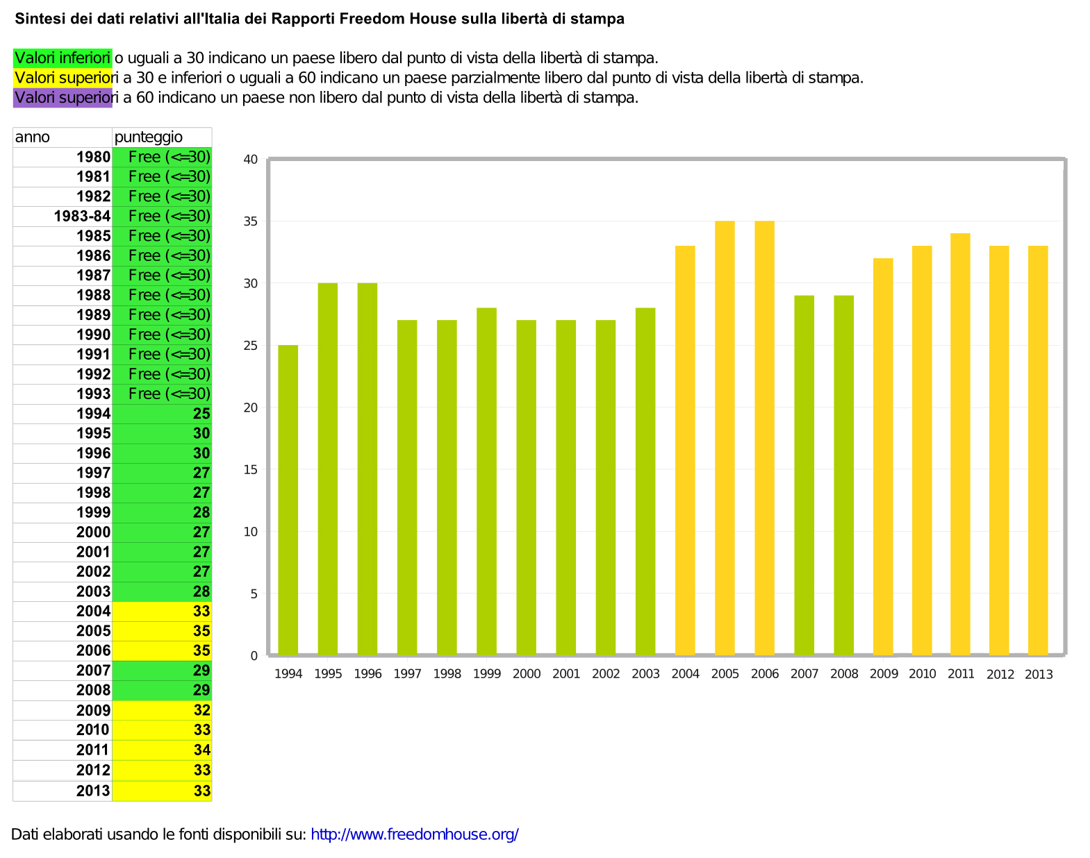 Sintesi dei dati relativi all'Italia del rapporto Freedom House sulla libertà di stampa dal 1980 al 2008. E' riportato solo il dato di sintesi complessivo relativo all'Italia.